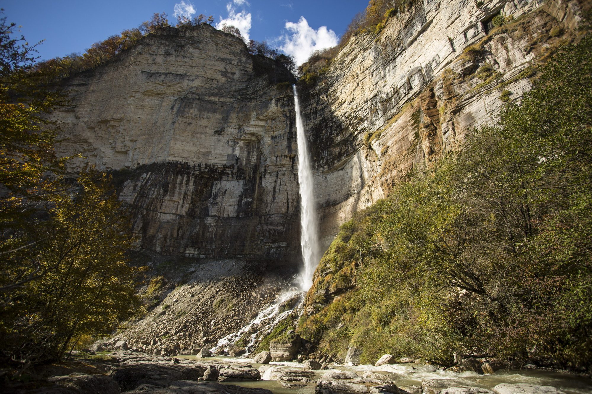 ოკაცეს (კინჩხას) ჩანჩქერის ბუნების ძეგლი ღირშესანიშნაობა: ბუნების ძეგლი წარმოადგენს მდ. საწისქვილოს ხეობაში, ასხის კირქვული მასივის აღმოსავლეთ ქარაფიდან, სამ საფეხურად გადმომავალ ჩანჩქერების კასკადს. ზედა ორი საფეხური მდ. საწისქვილოს მარჯვენა შენაკადზეა წარმოქნილი, პირველის სიმაღლე დაახლოებით 25 მ-ია ხოლო მეორე ჩანჩქერის სიმაღლე 70 მ-მდე აღწევს. ნაკადის მდ. საწისქვილოსთან შეერთების შემდეგ 20 მეტრში წარომიქმნეაბა კასკადის მესამე დაახლოებით 35 მ სიმაღლის საფეხური. მდებარეობა: ხონის მუნიციპალიტეტი, სოფ. კინჩხას მიდამოები, 843 მეტრი ზღვის დონიდან. კოორდინატები: N42 29.738 E42 33.032